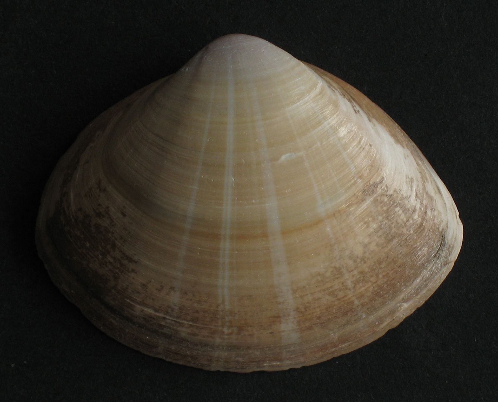 Mactra corallina - bunte Trogmuschel